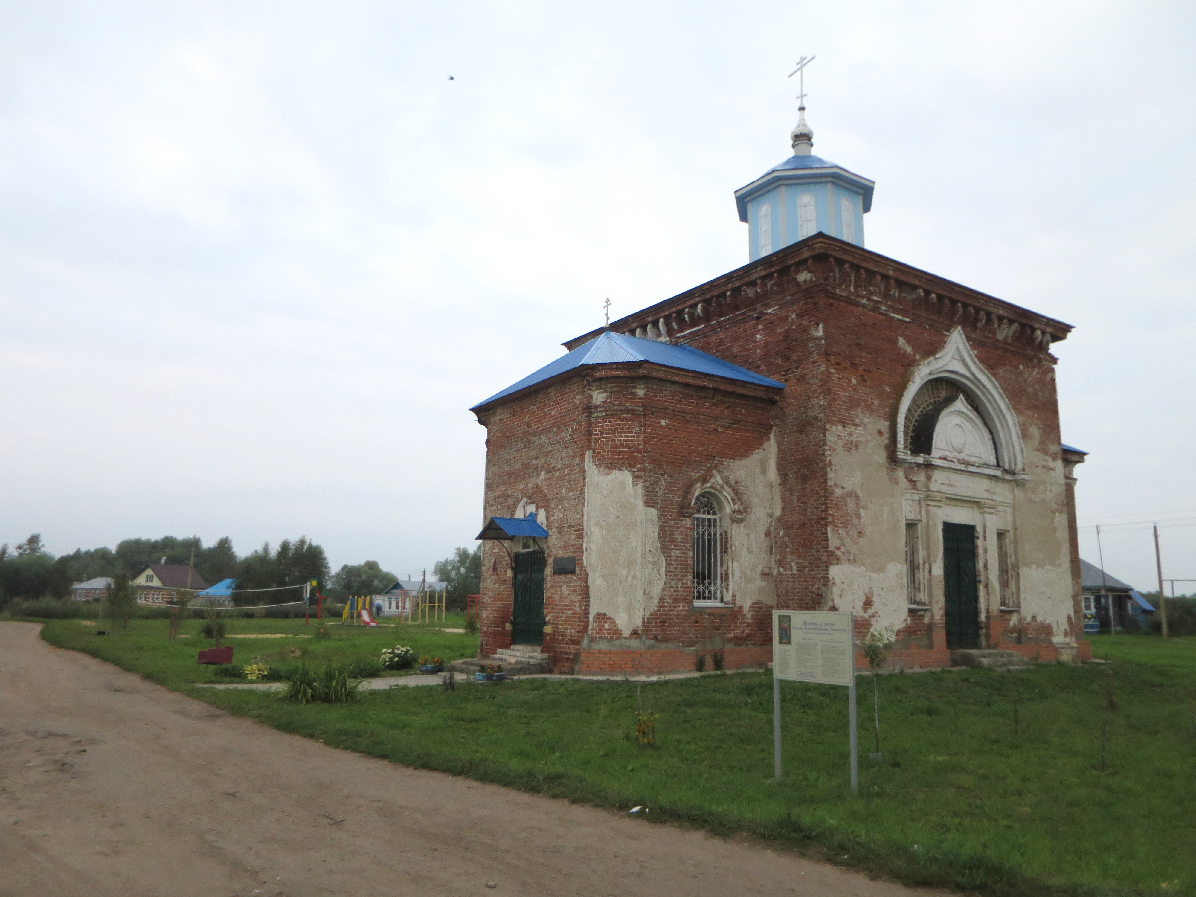 Церковь в с. Пятницы, Арзамасский район